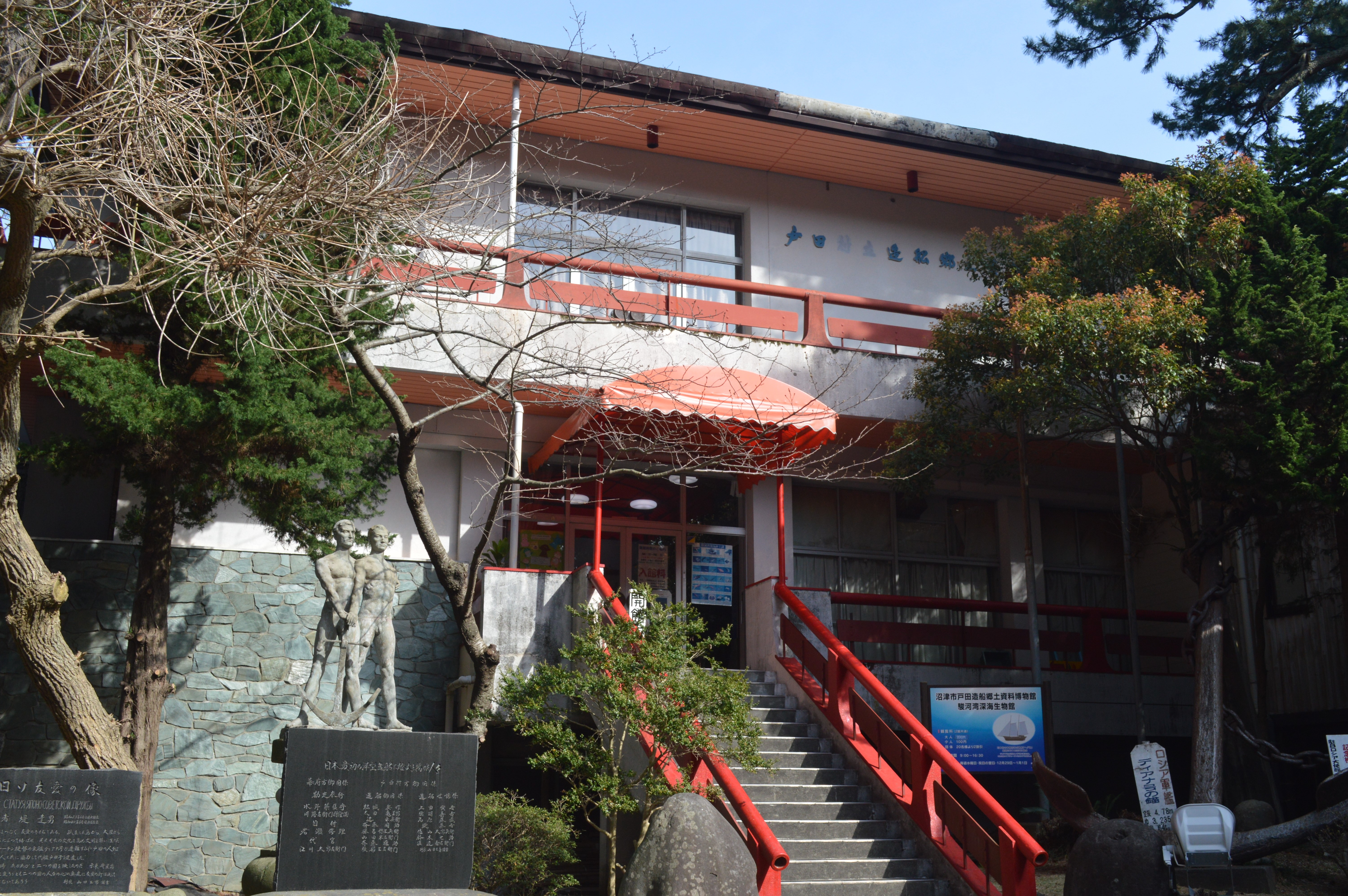 静岡県沼津市戸田にある沼津市造船戸田郷土資料博物館。